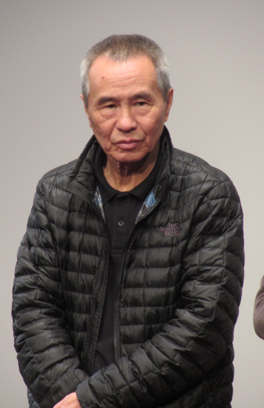 Hou Hsiao-hsien à l'avant-première de "The Assassin" à la cinémathèque française